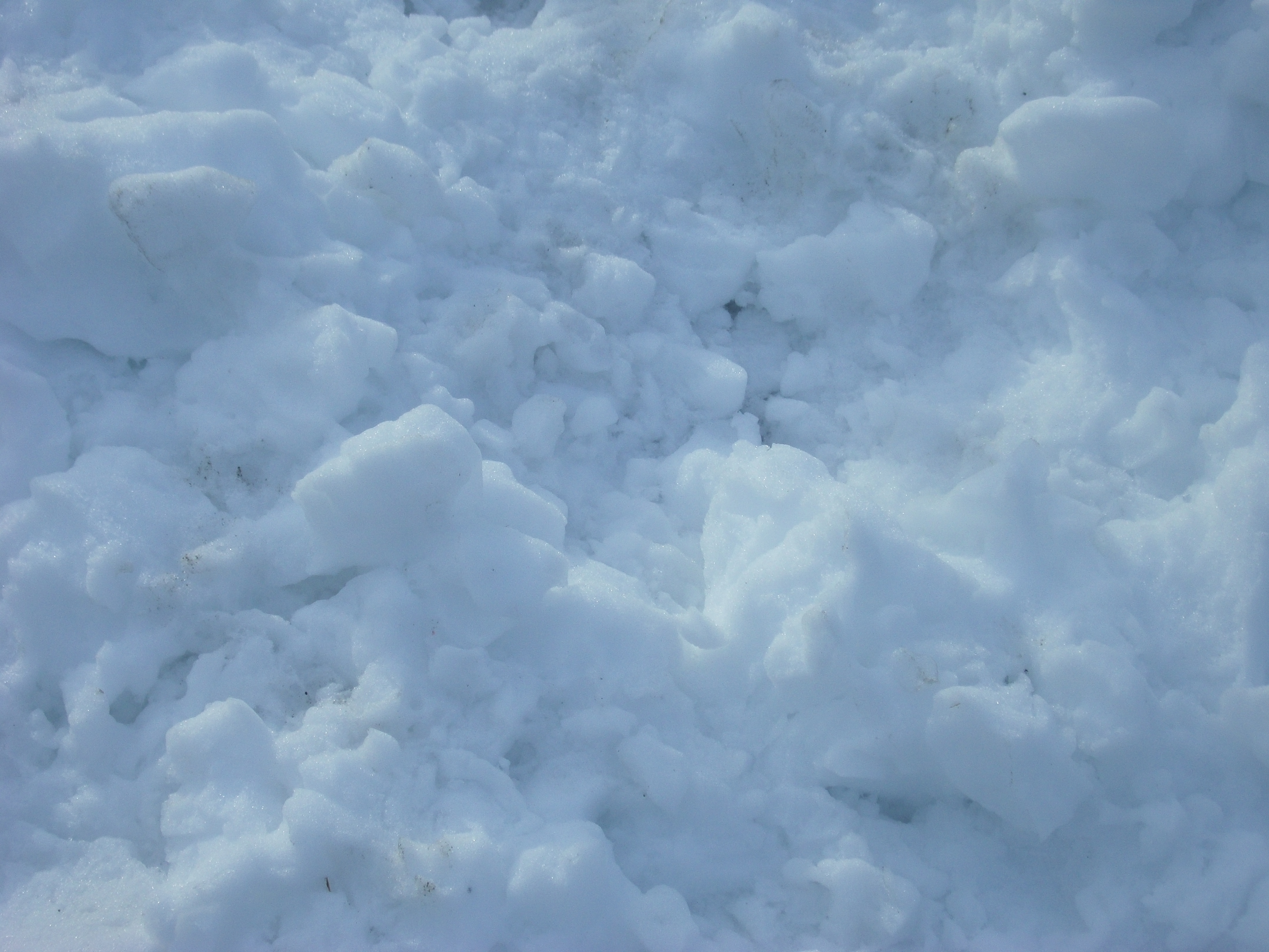 平賀学園台に降った雪